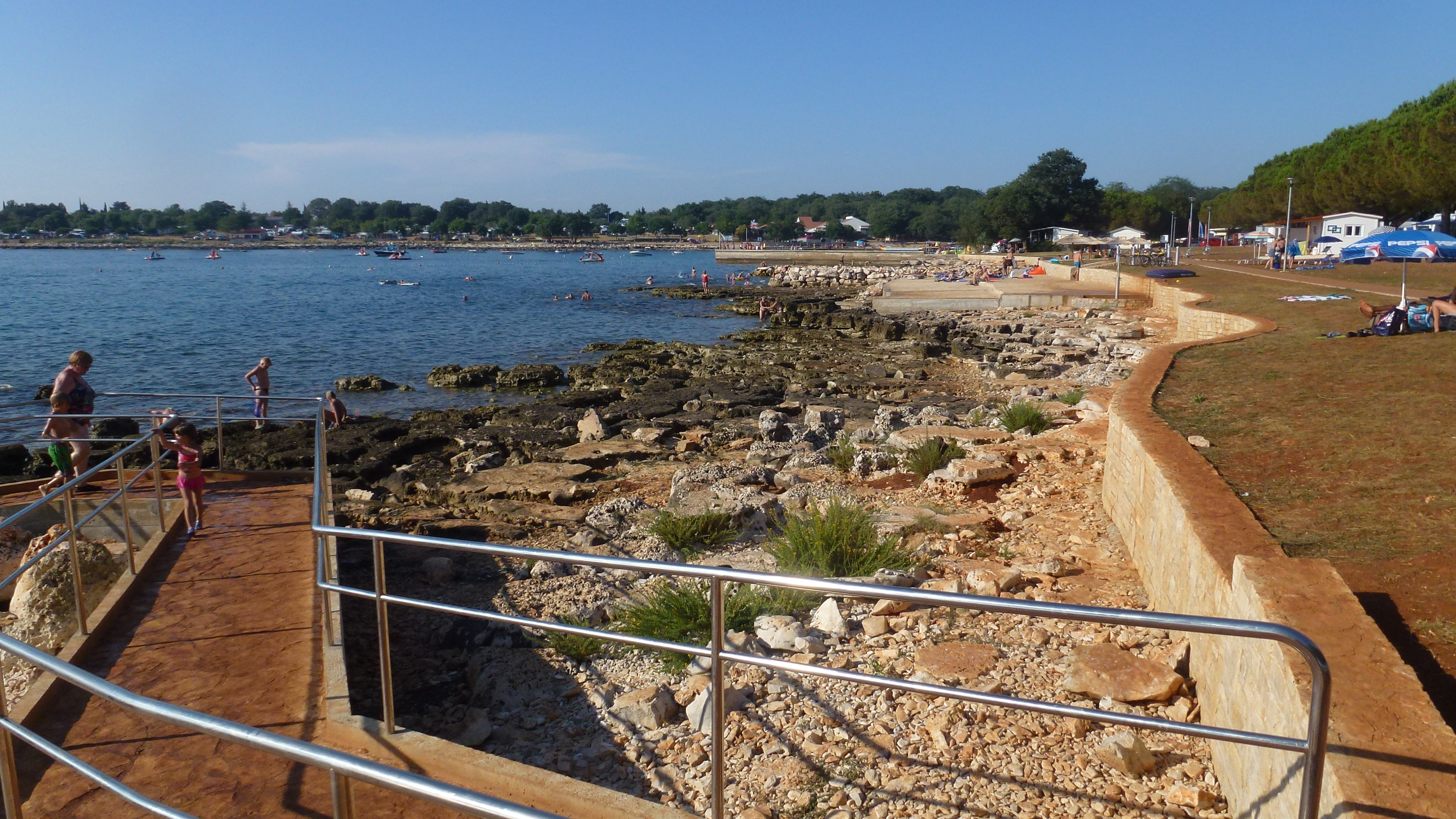 Karigador, Croatia